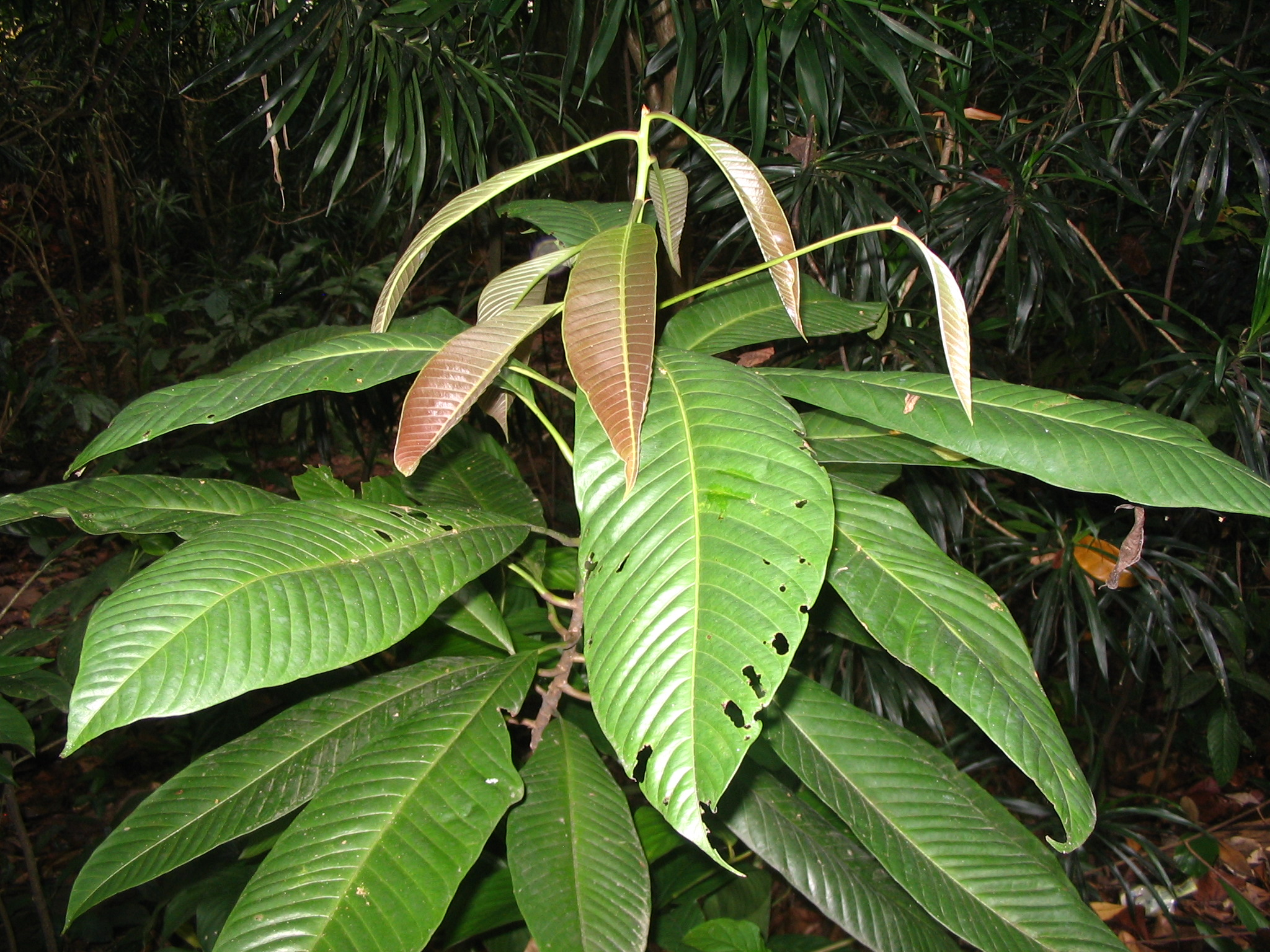 Eusideroxylon zwageri - Bukit Nanas Forest Reserve - Kuala Lumpur